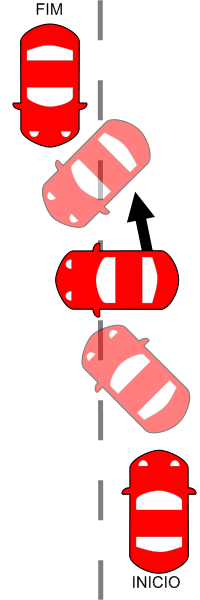 Cavalo de pau